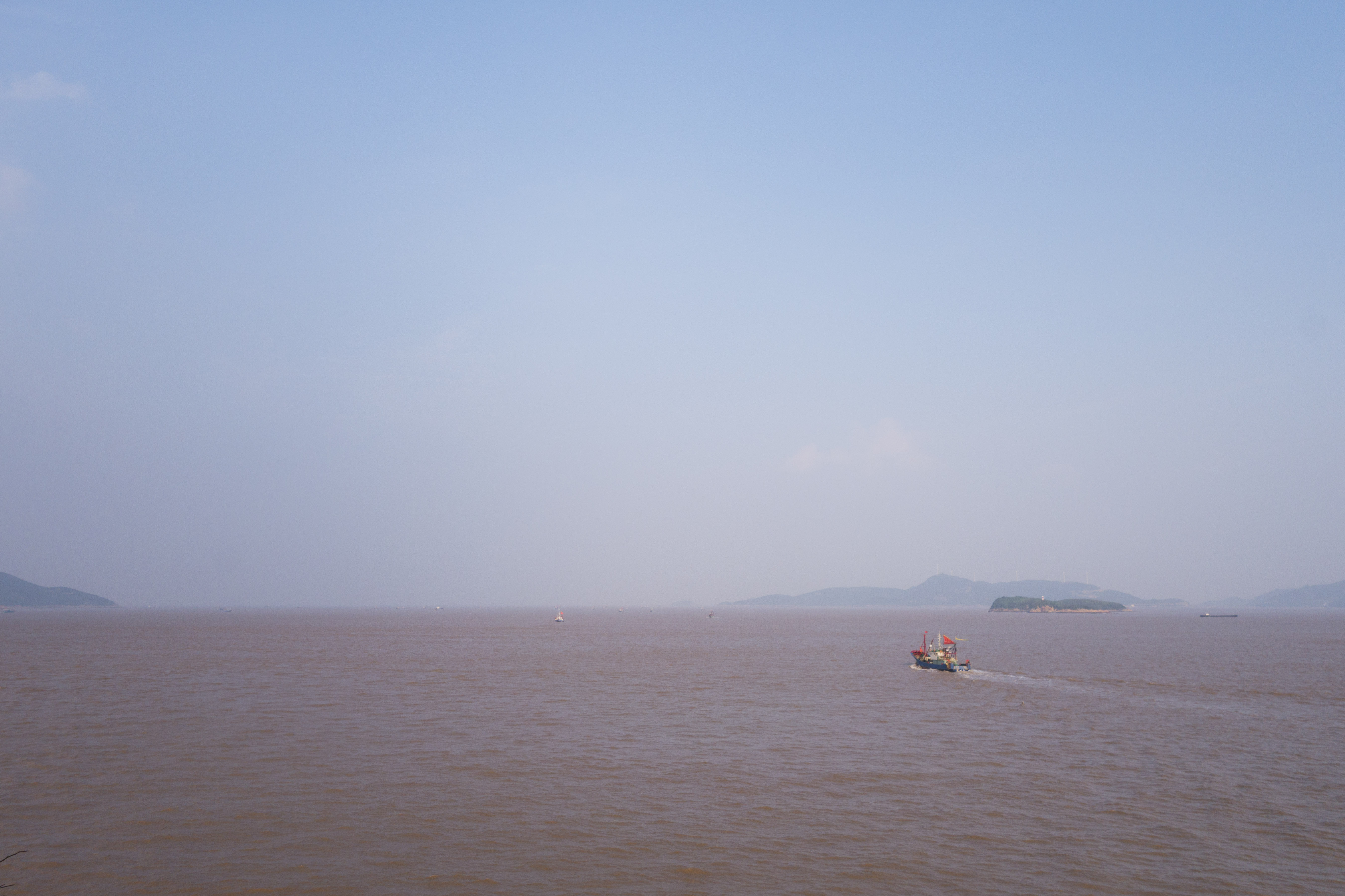 象山东门岛与檀头山之间的海域